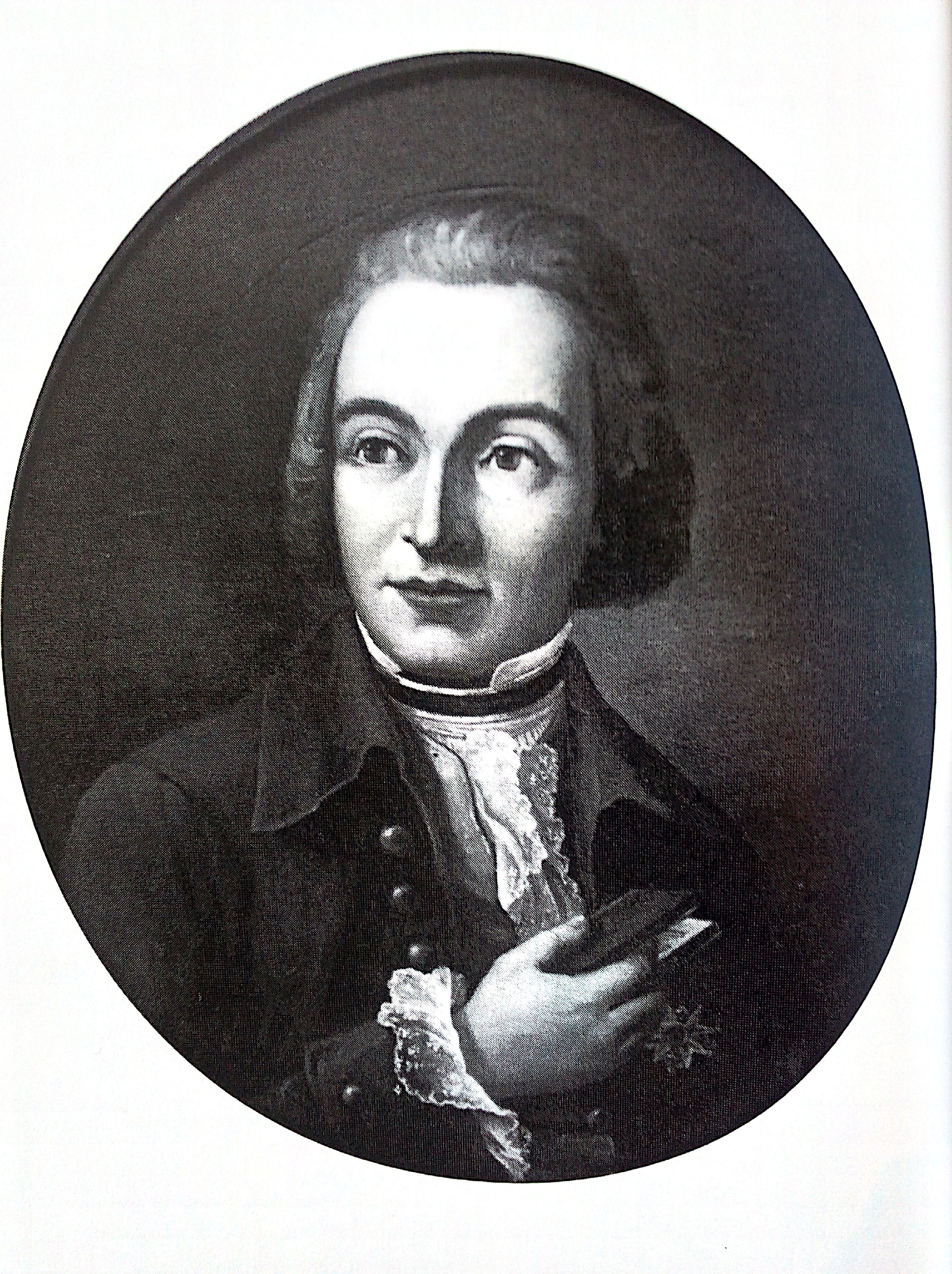 Gravure, auteur inconnu, collection particulière.